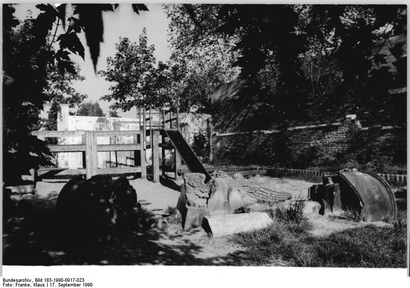 ADN- Klaus Franke/ BER-23-17.9.90-Berlin: Schloß-Trümmer-Im vierten Hinterhof der Kastanienallee 12 gestalten eine Bürgerinitiative und eine Gruppe Bildhauer mit Elementen des ehemaligen Berliner Schlosses eine erholsame Oase. Dekorative Stuckteile, Architekturdetails und Säulen machen den Spielplatz wirklich abenteuerlich.